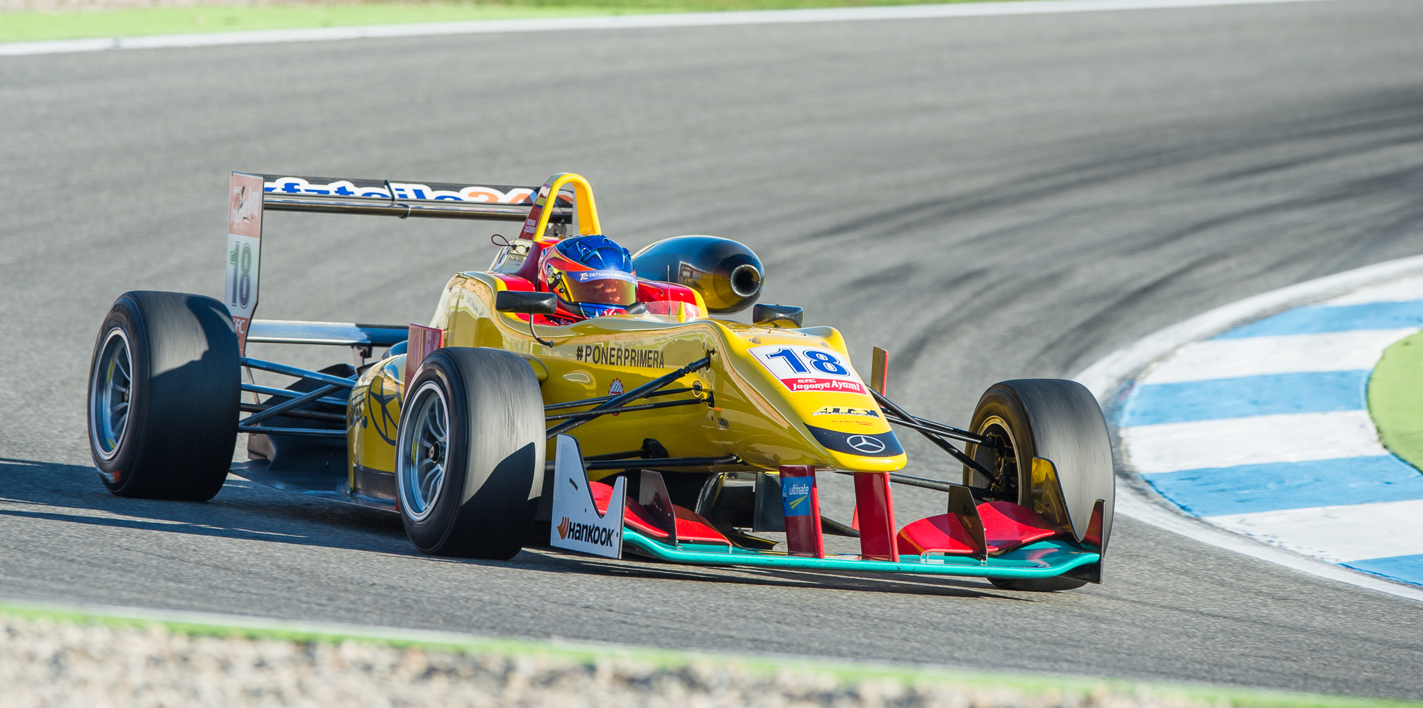 DTM,Dallara F312,Deutsche Tourenwagen Masters,F3 FIA European Championship,FIA Formel 3 Europameisterschaft,Hockenheimring,Jo Zeller Racing,Mercedes-Benz,Motorsport,Tatiana Calderon,Tatiana Calderón